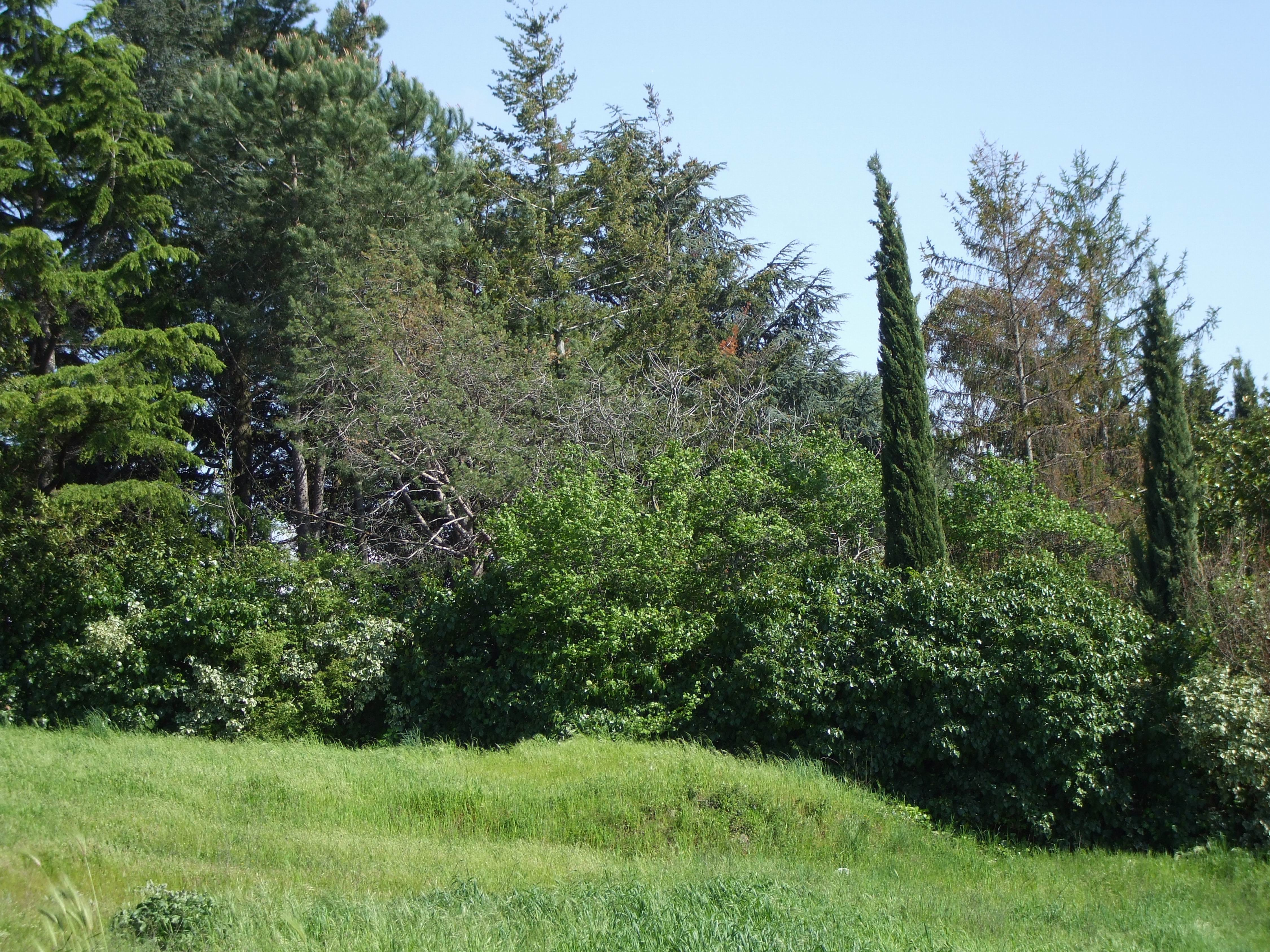 Cecchina di Albano Laziale - particolare di campagna collinare